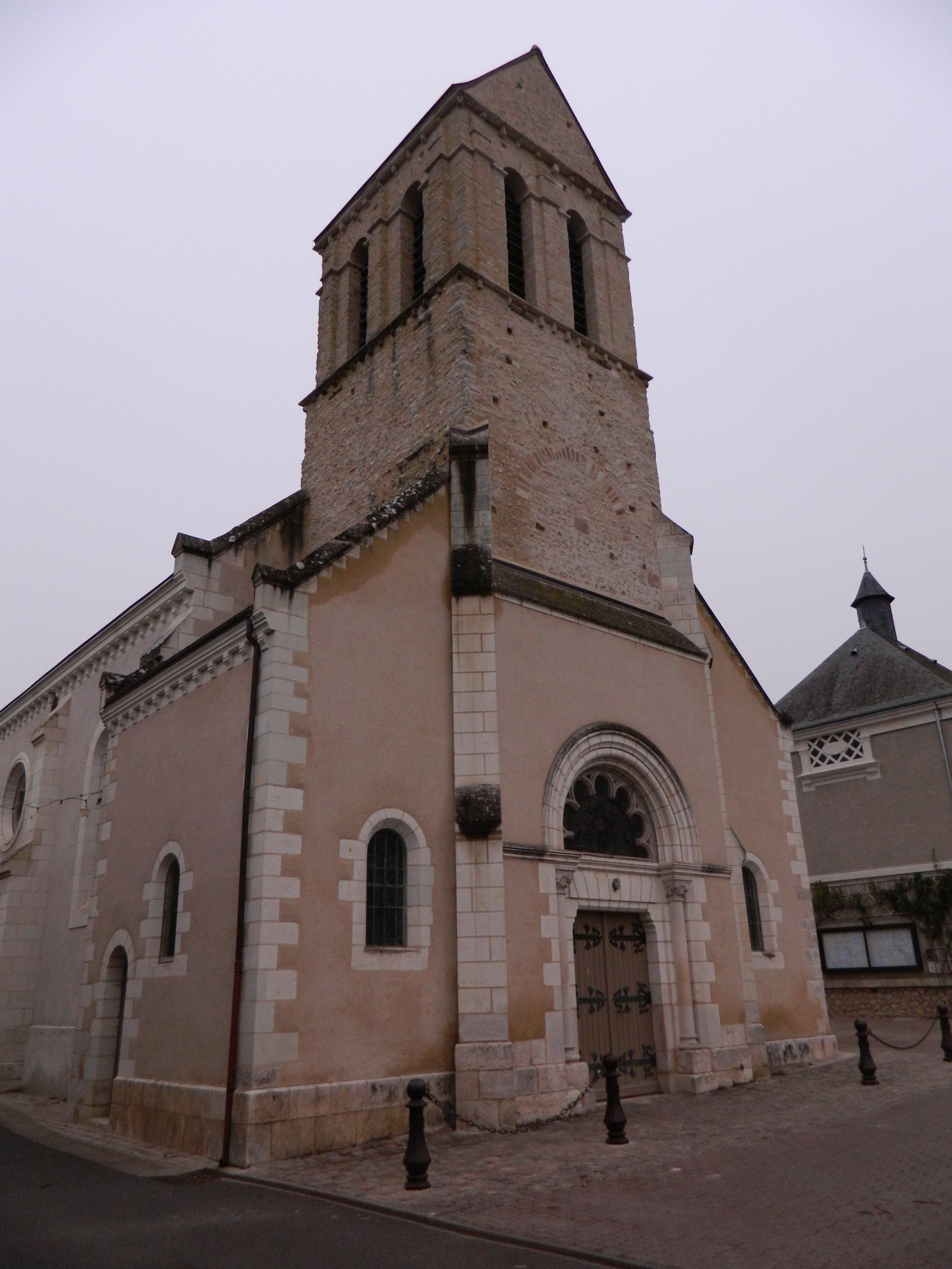 Église paroissiale Saint-Etienne de Reignac-sur-Indre